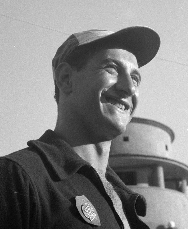 Europese zwemkampioenschappen te Monaco. Alex Jany (Frankrijk) kampioen 400 meter vrije slag heren